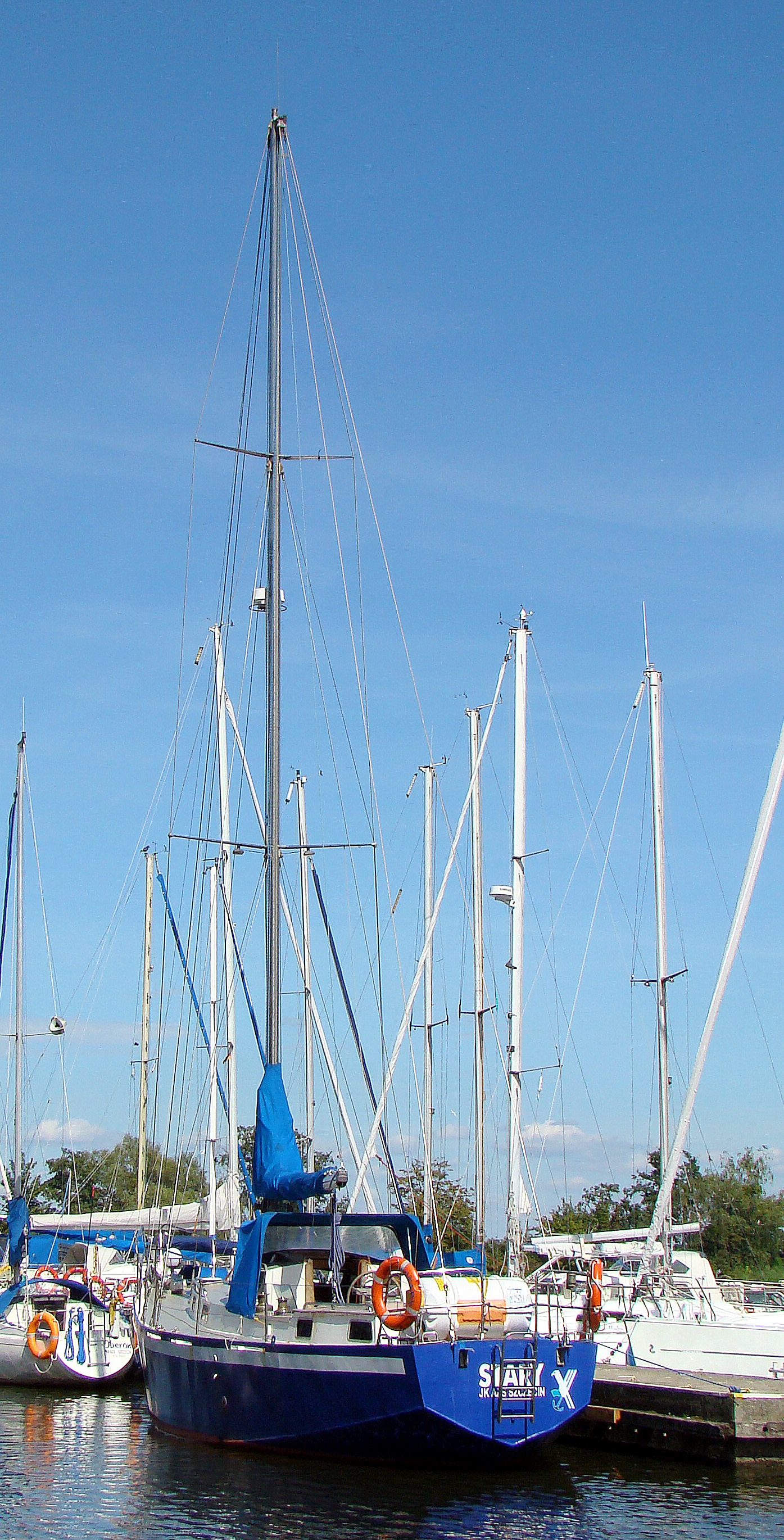 SY Stary, Szczecin, Polska